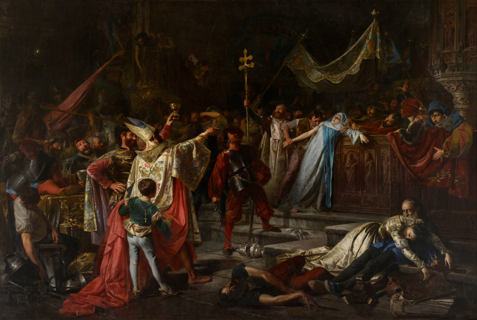 Pintura en la qual es representa una de les escenes de l'entrada de les tropes de Carles V a Roma. Els protagonistes esmentats esdevenen veritables punts de llum de la composició, i són envoltats per altres personatges adults i infants. Al centre del marge inferior de la tela hi ha un home mort al terra